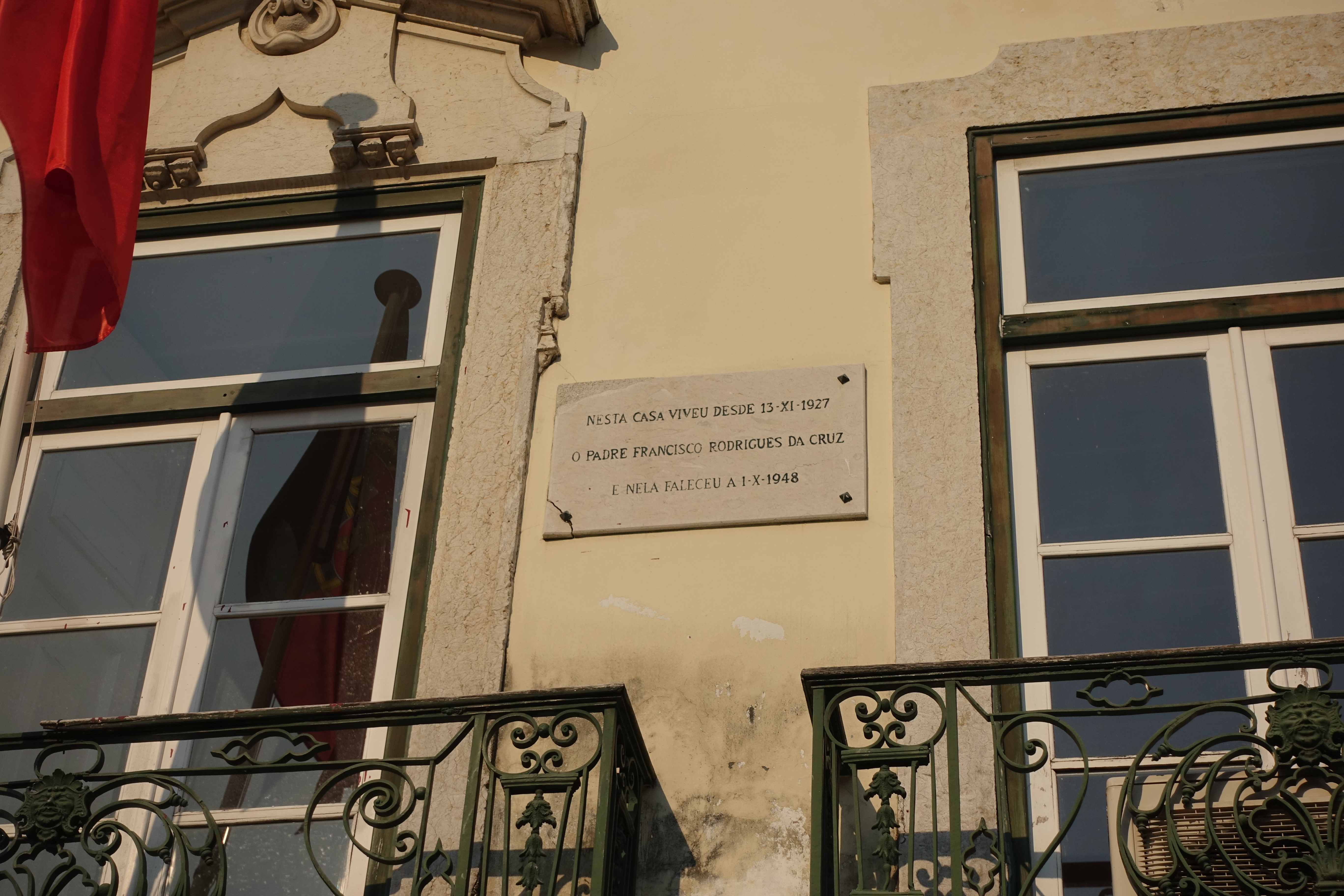 Placa situada no Largo Adelino Amaro da Costa (Largo do Caldas) da Rua da Madalena, em Lisboa, Portugal